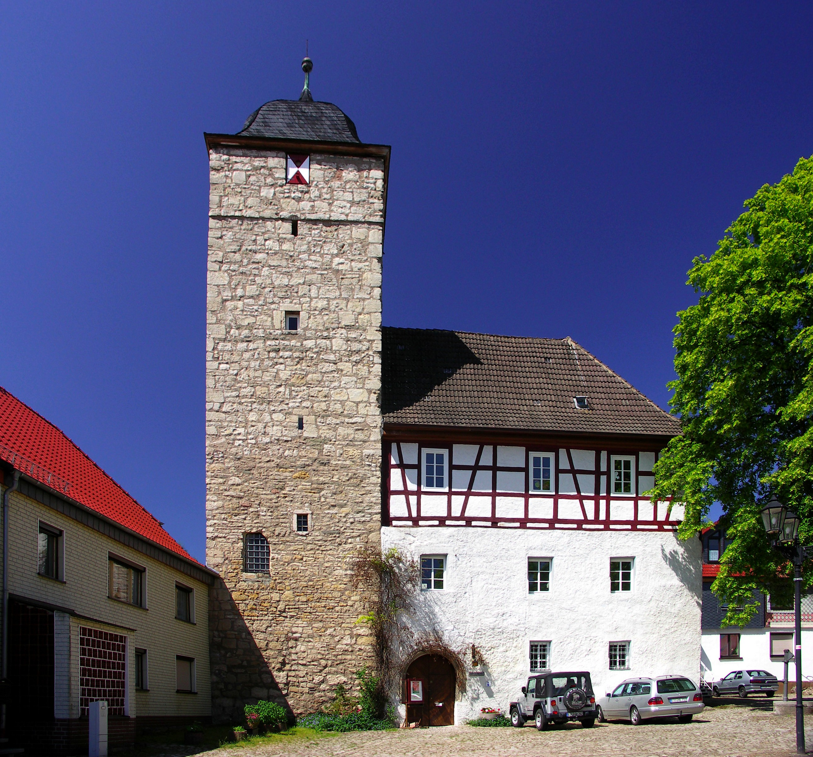 Burg (Schloss) Grossbodungen, Wartturm und Kemenate vom Schlossplatz aus gesehen.